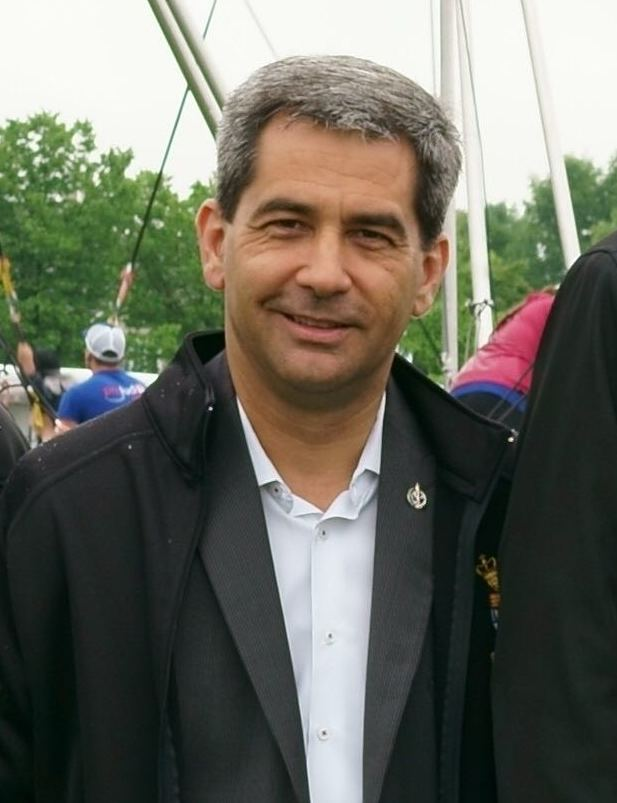 Joyeuse Fête nationale du Québec de Saint-Augustin-de-Desmaures avec Joël Godin, Gérard Deltell, Pierre Paul-Hus and Alupa Clarke! Happy Fête nationale du Québec from Saint-Augustin-de-Desmaures with Joël Godin, Gérard Deltell, Pierre Paul-Hus et Alupa Clarke!